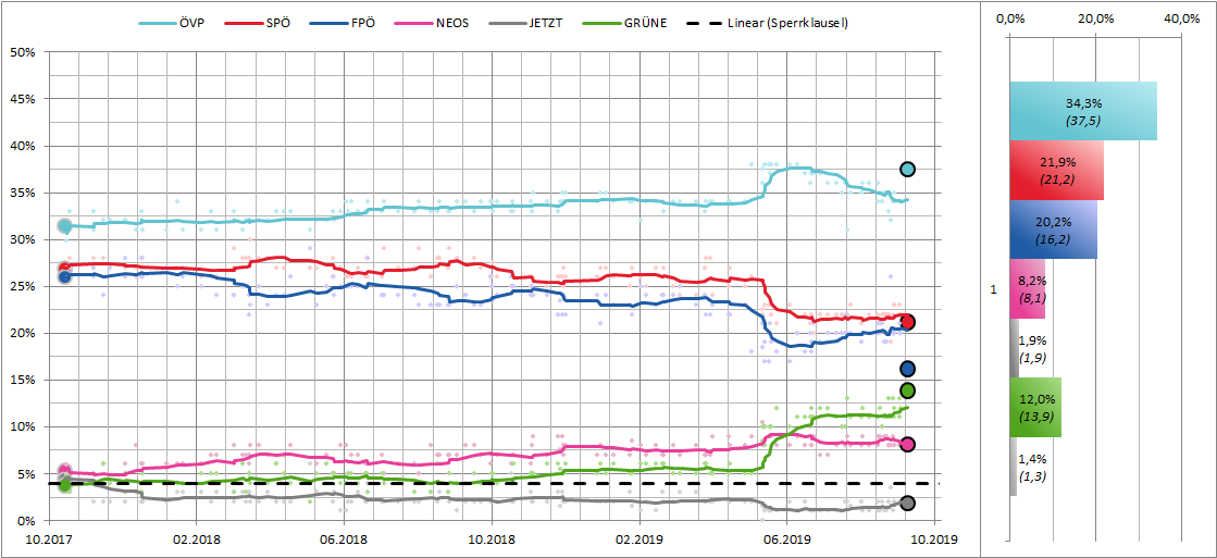 Dies ist ein Diagramm, das Mittelwerte der verschiedensten Umfragen & Prognosen beinhaltet.